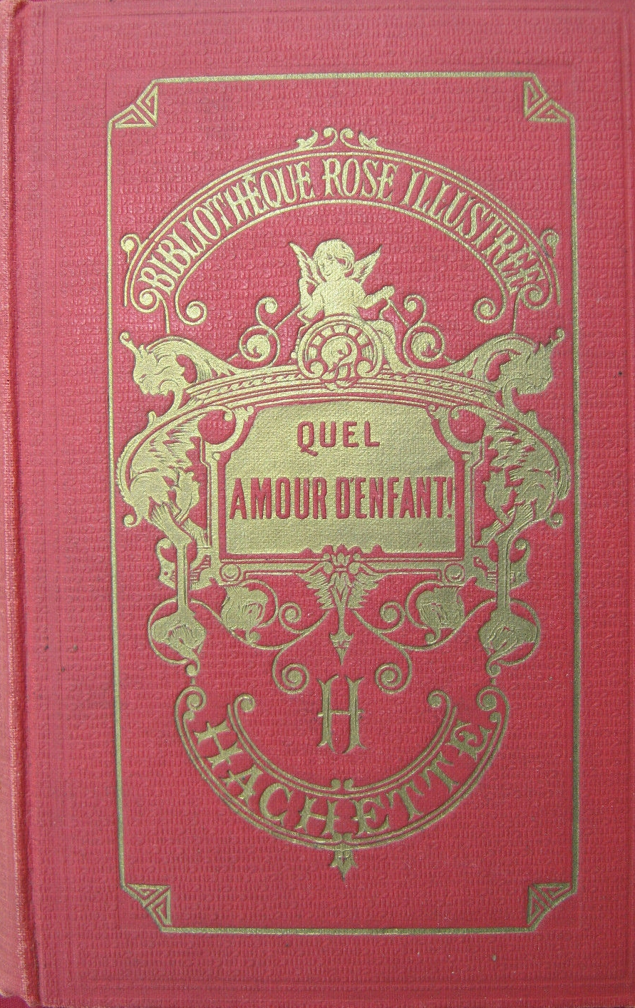 Comtesse de Ségur, Quel amour d'enfant ! (1867), Bibliothèque rose, illustrations d'Émile Bayard.